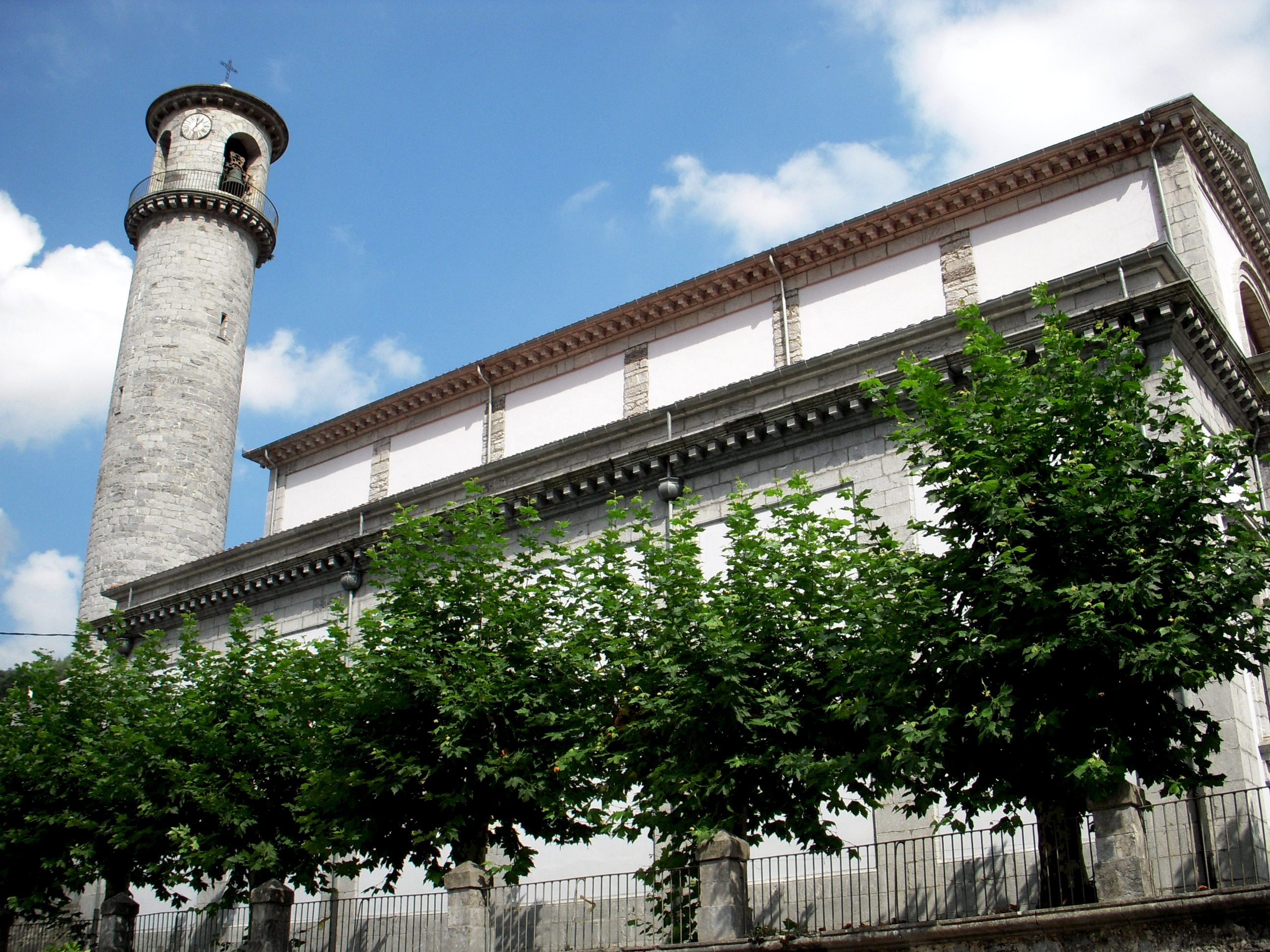 Resalta la arquitectura neo-clásica del S. XIX